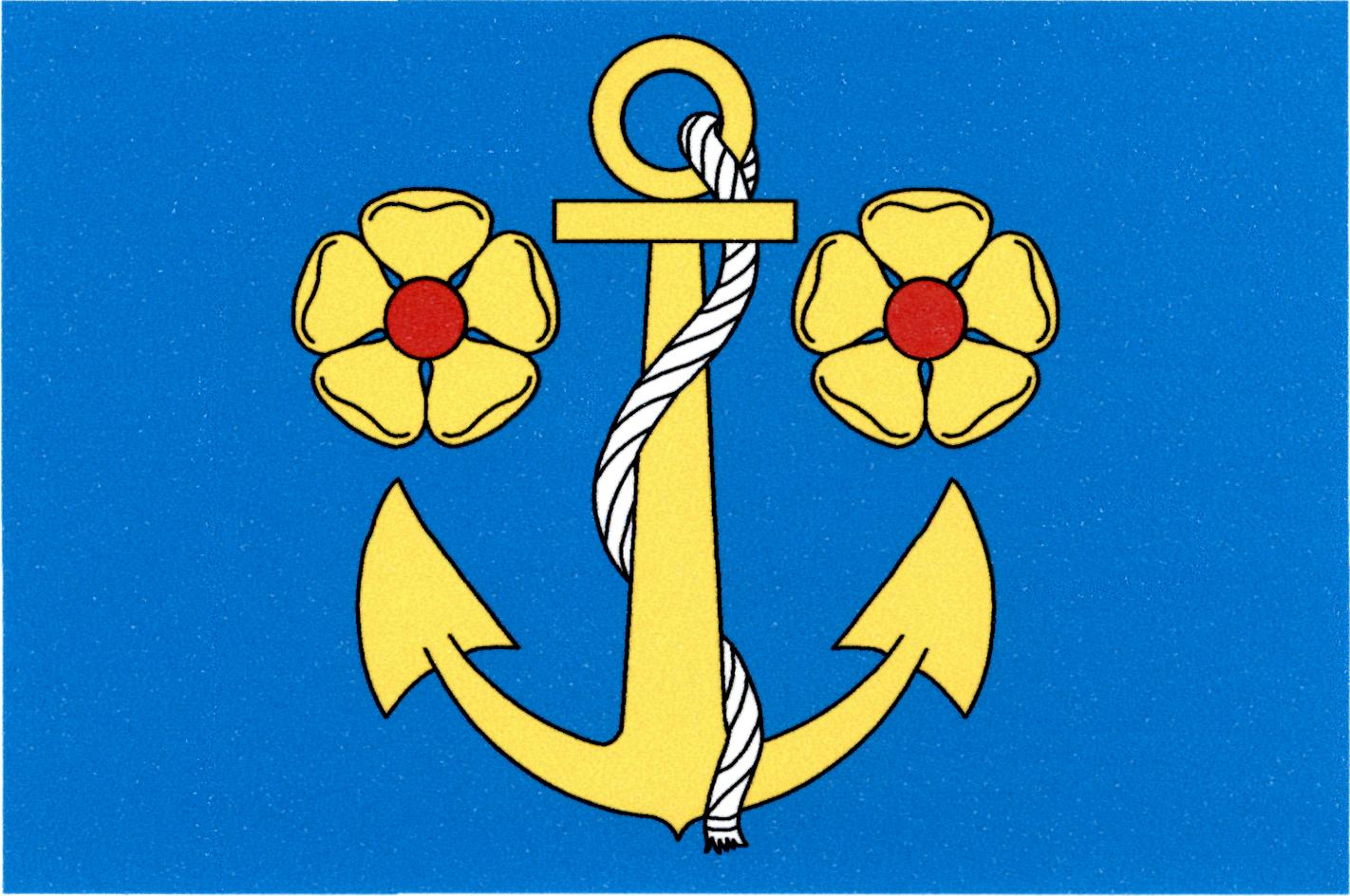 Vlajka obce Střížovice (okres Jindřichův Hradec)